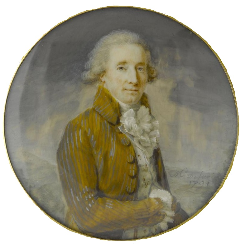 Portrait de Jacques Nicolas Billaud-Varenne. Peinte par Jeanne Doucet de Surigny, cette miniature orne le couvercle d'une boîte en écaille brune, cerclée d'or ciselé à motifs floraux (musée Cognacq-Jay, vers 1791).